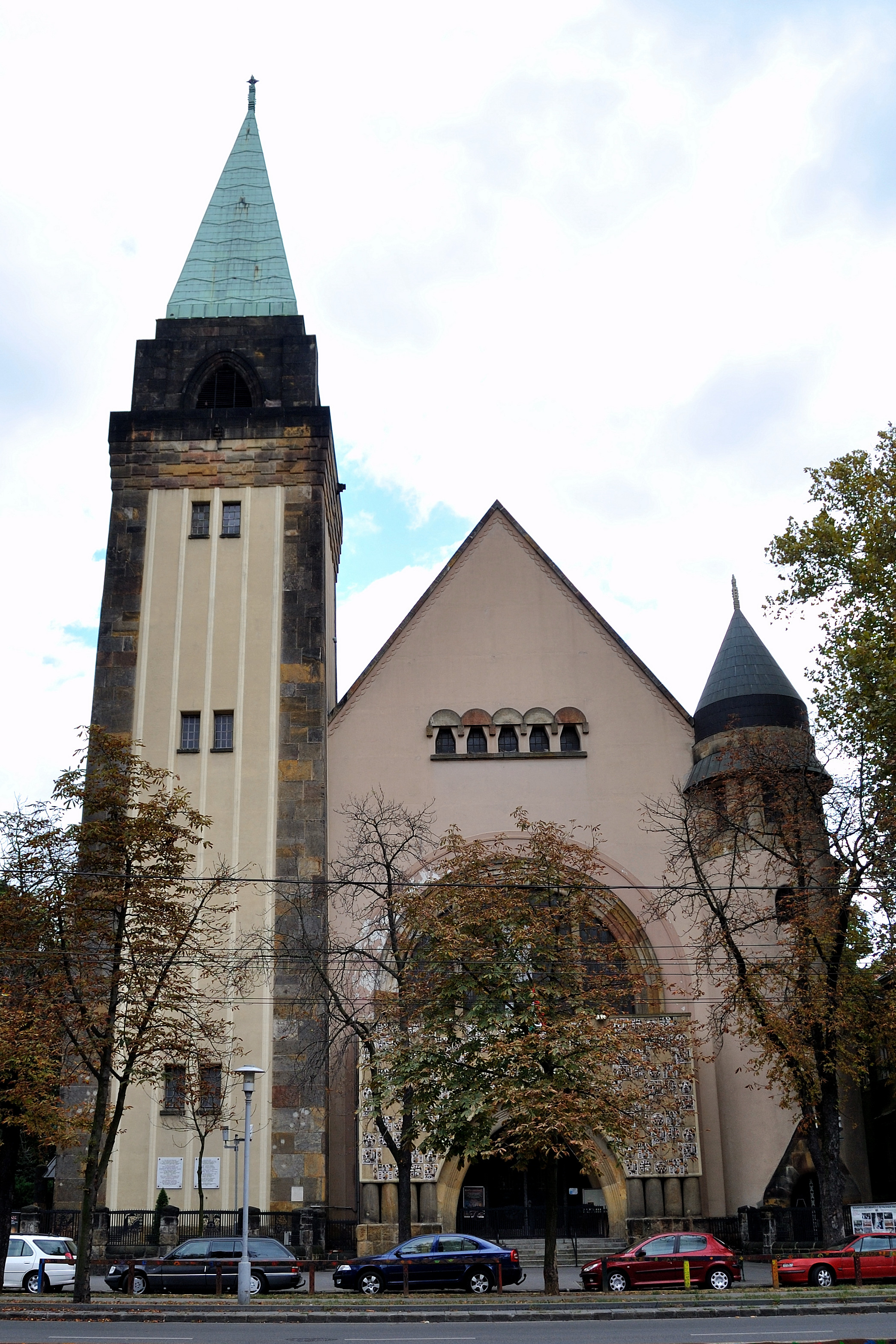 Ref. templom (Budapest 7, Városligeti fasor 5-7.) This is a photo of a monument in Hungary. Identifier: 859